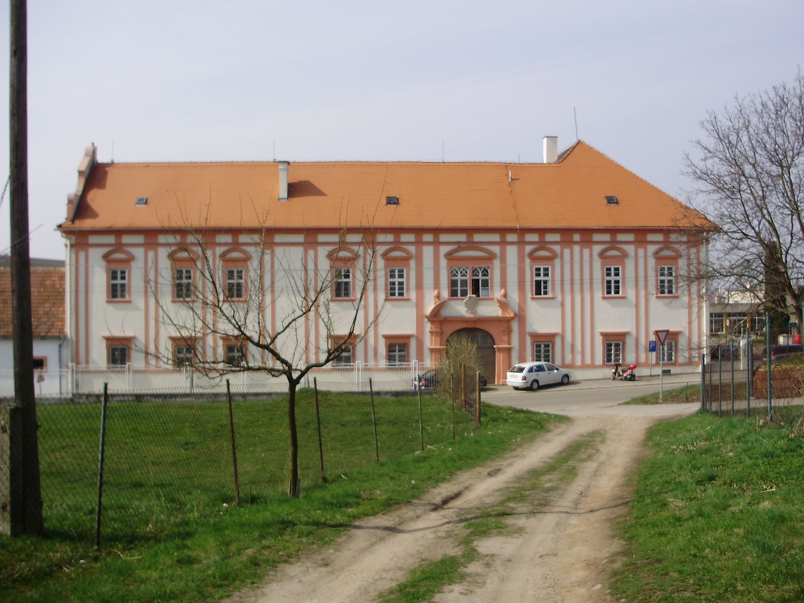 Zámek